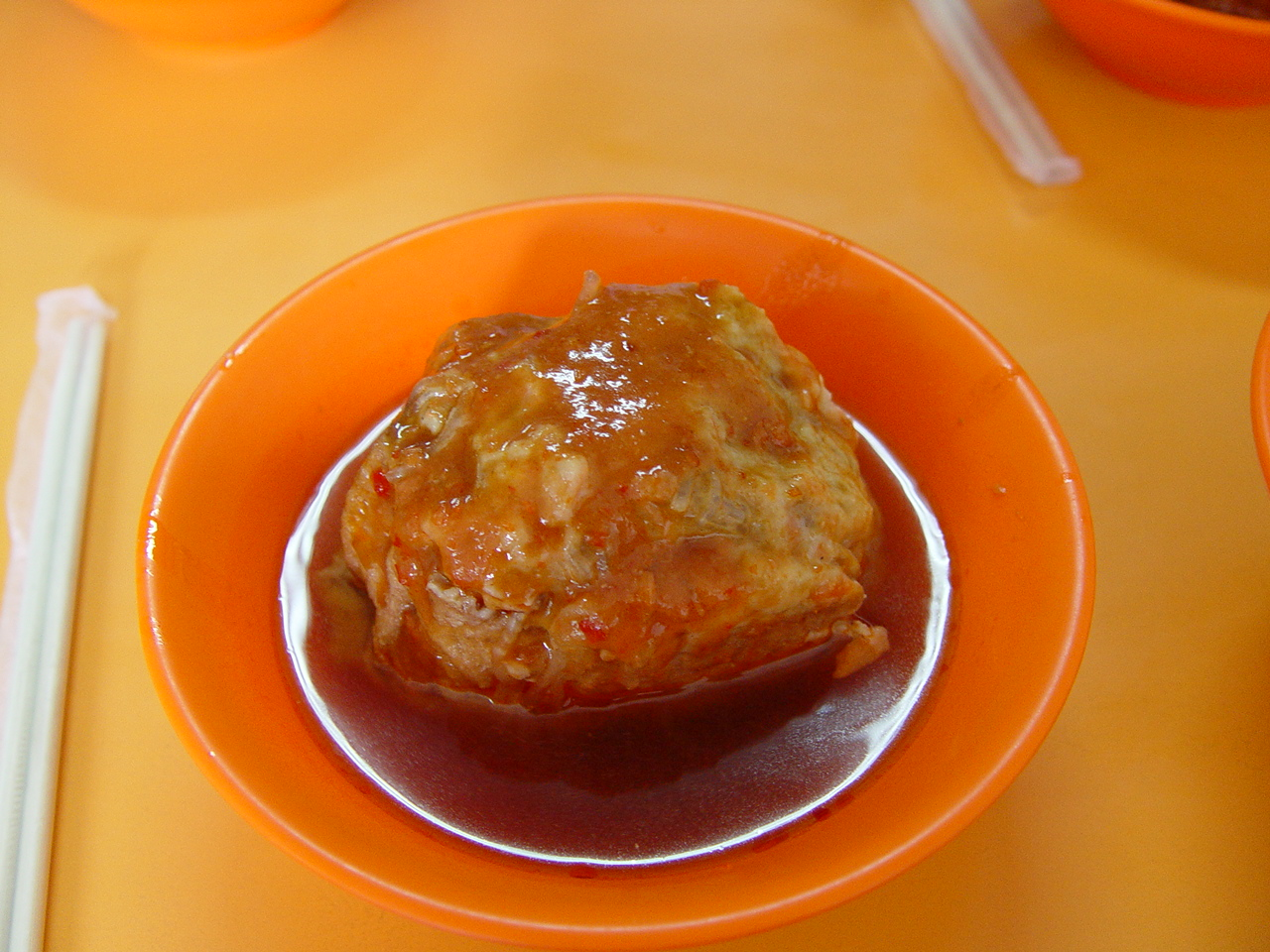 台灣小吃阿給，阿仁於2005年6月27日拍攝。